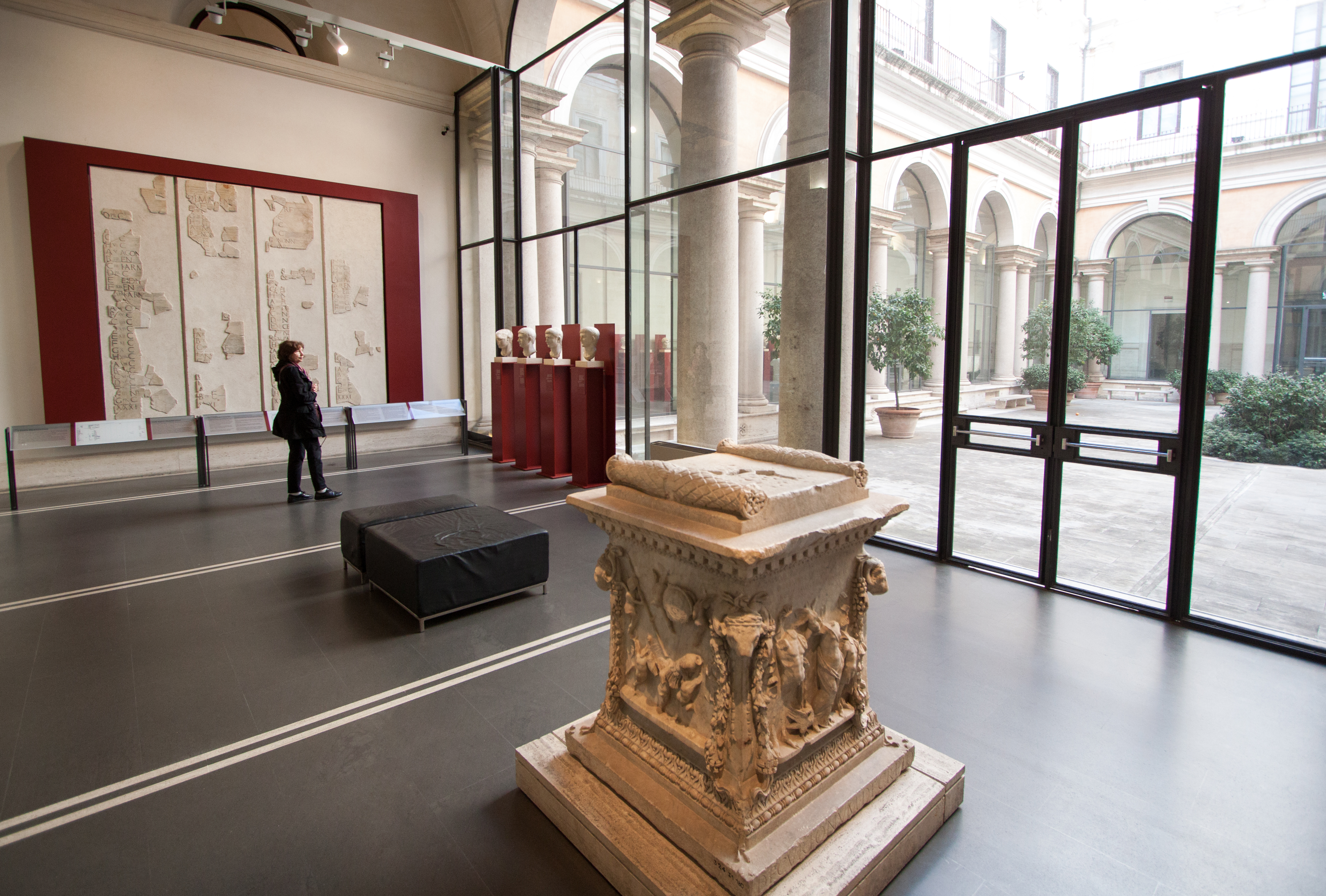 Palazzo Massimo interior